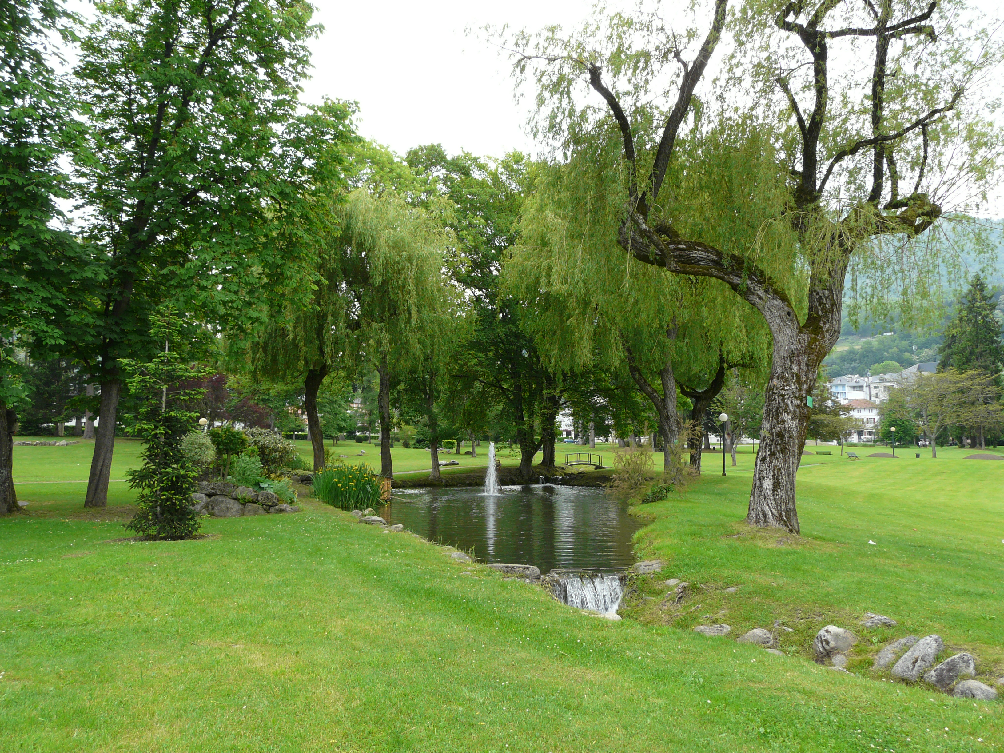 Ruisseau dans le parc thermal d'Argelès-Gazost, Hautes-Pyrénées, France.